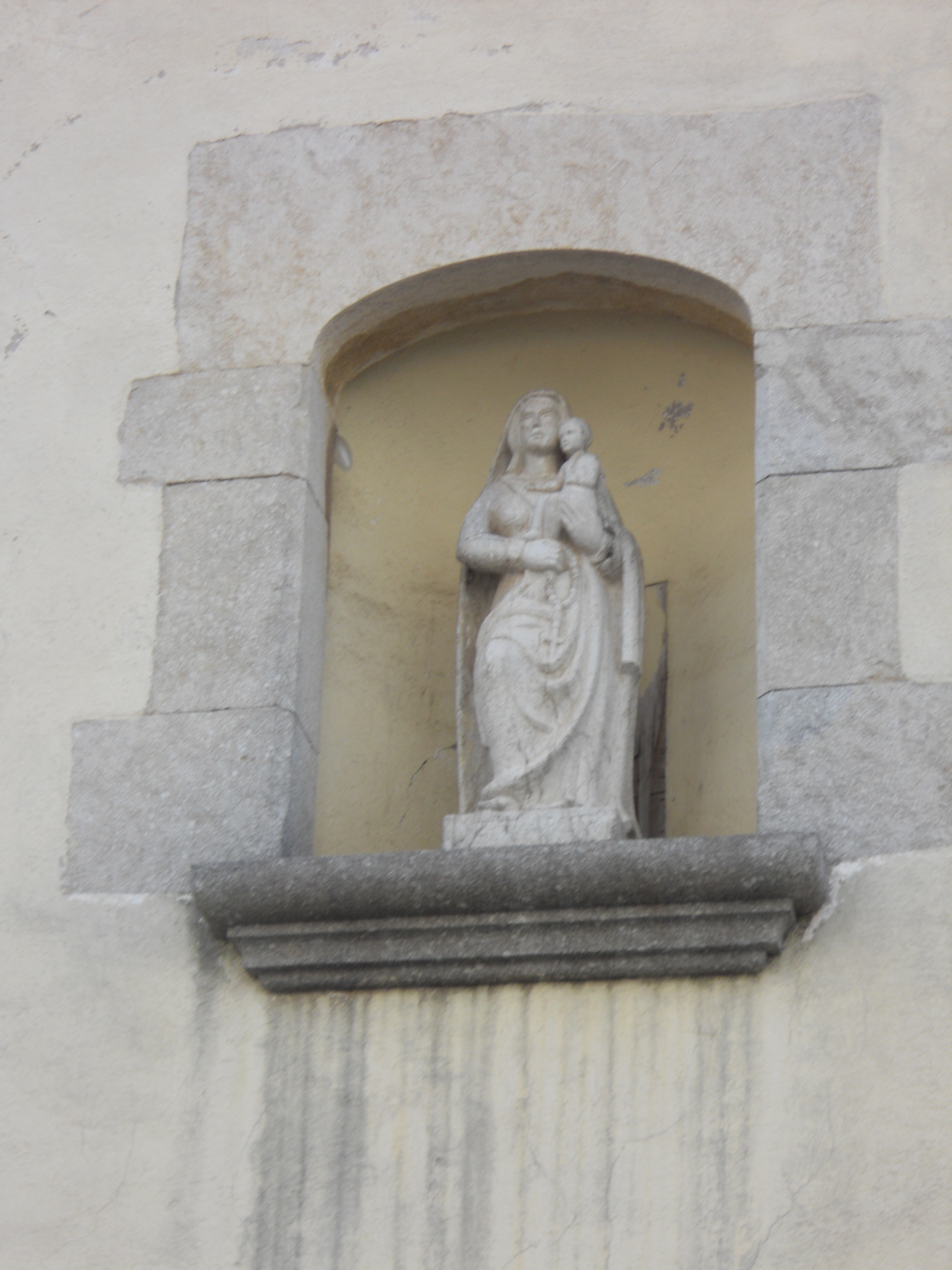 Detall de la façana de l'antic Hospital municipal de Palafrugell, edifici del segle XVIII.